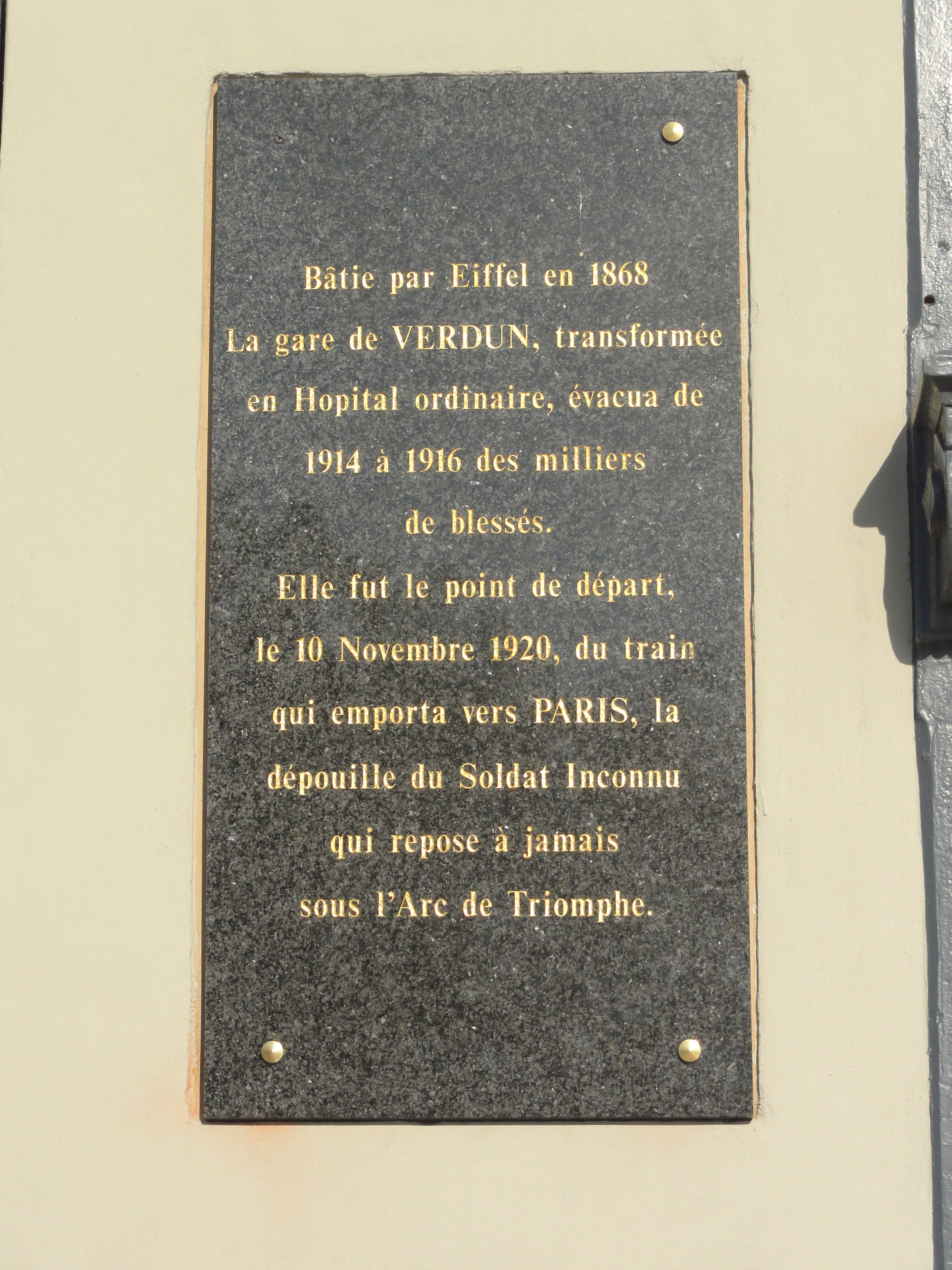 Verdun (Meuse) mémorial gare de Verdun